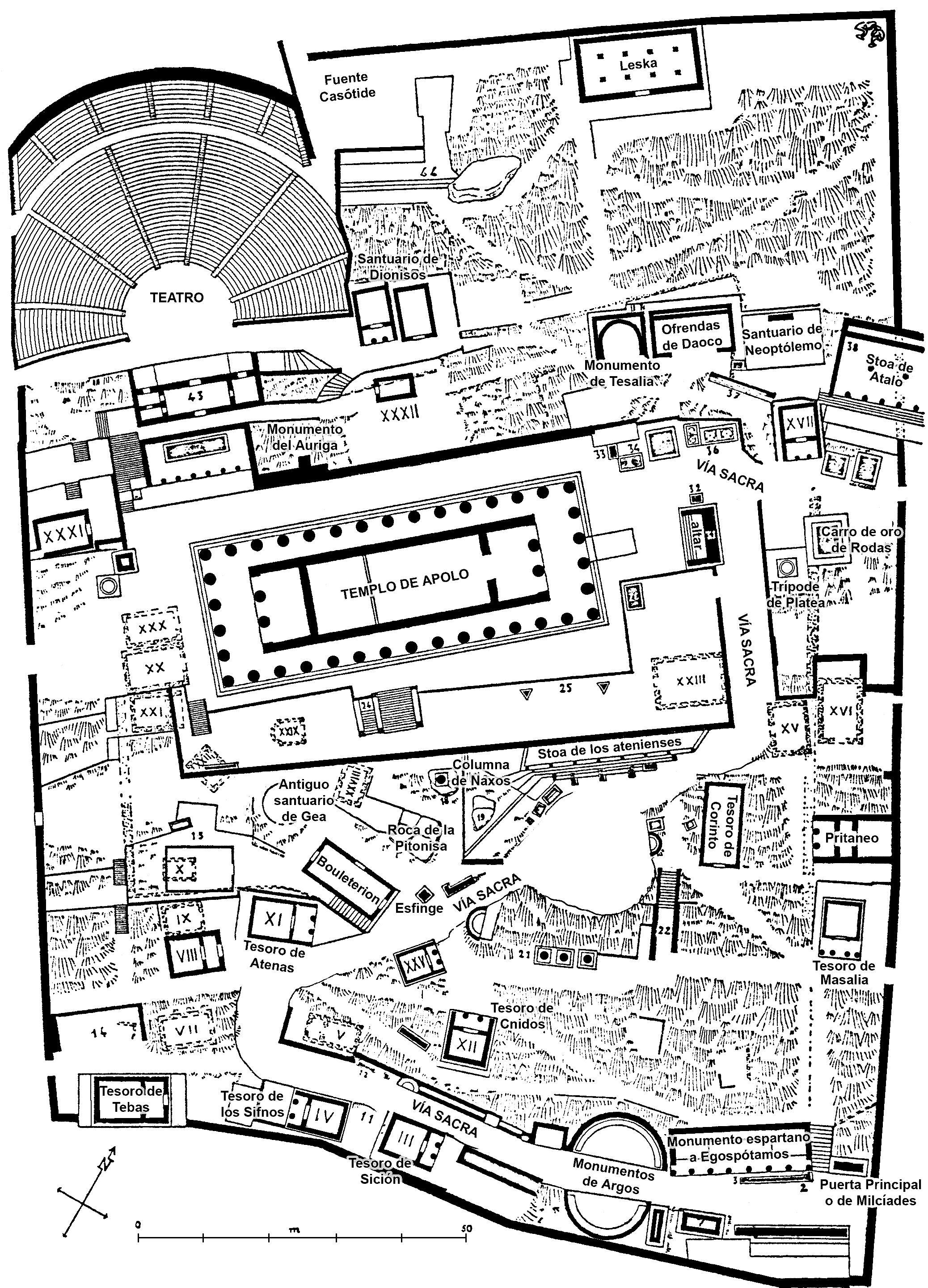 Plano en español del Santuario o Témenos de Apolo Pitio en Delfos según P. de la Coste-Messelière, 1936